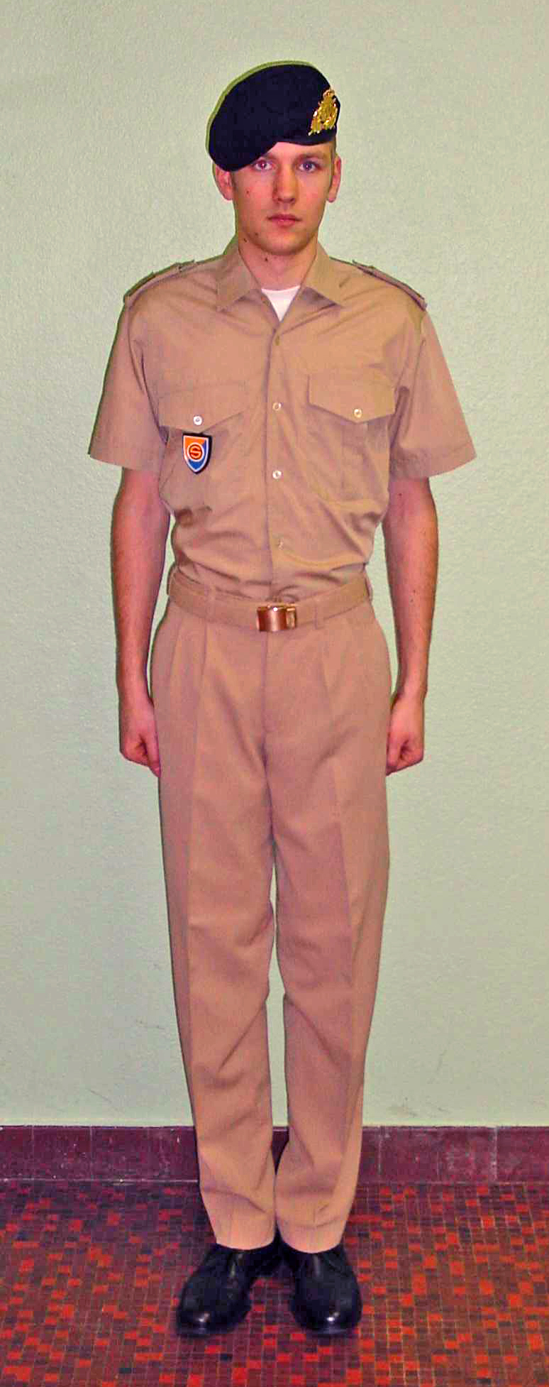 Lëtzebuerger Arméi Uniform Tenue S3E mat kuerzen Ärm